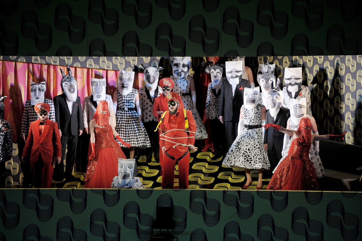 התורכי באיטליה 2008